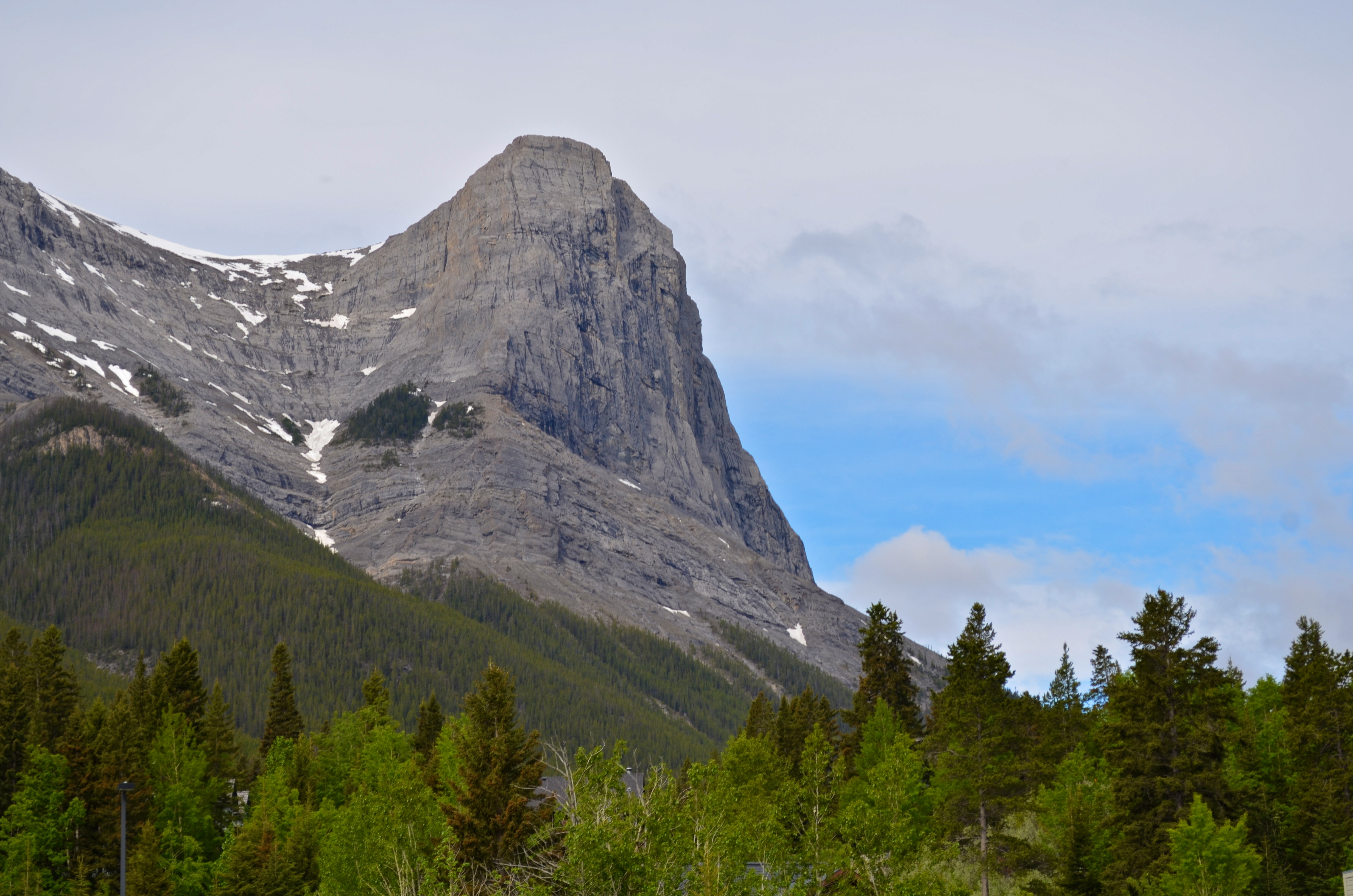 Ha Ling